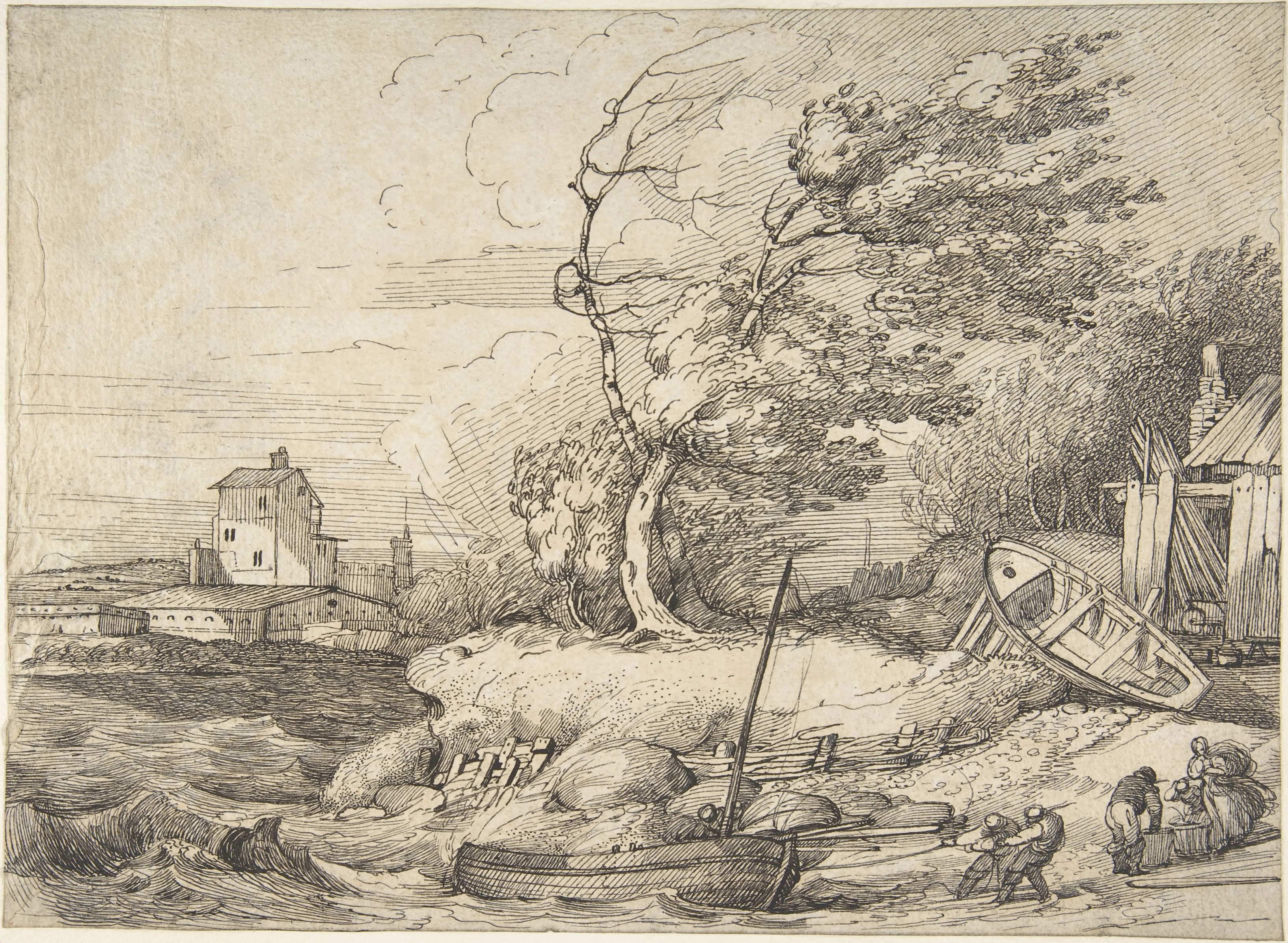 Drawing; Drawings